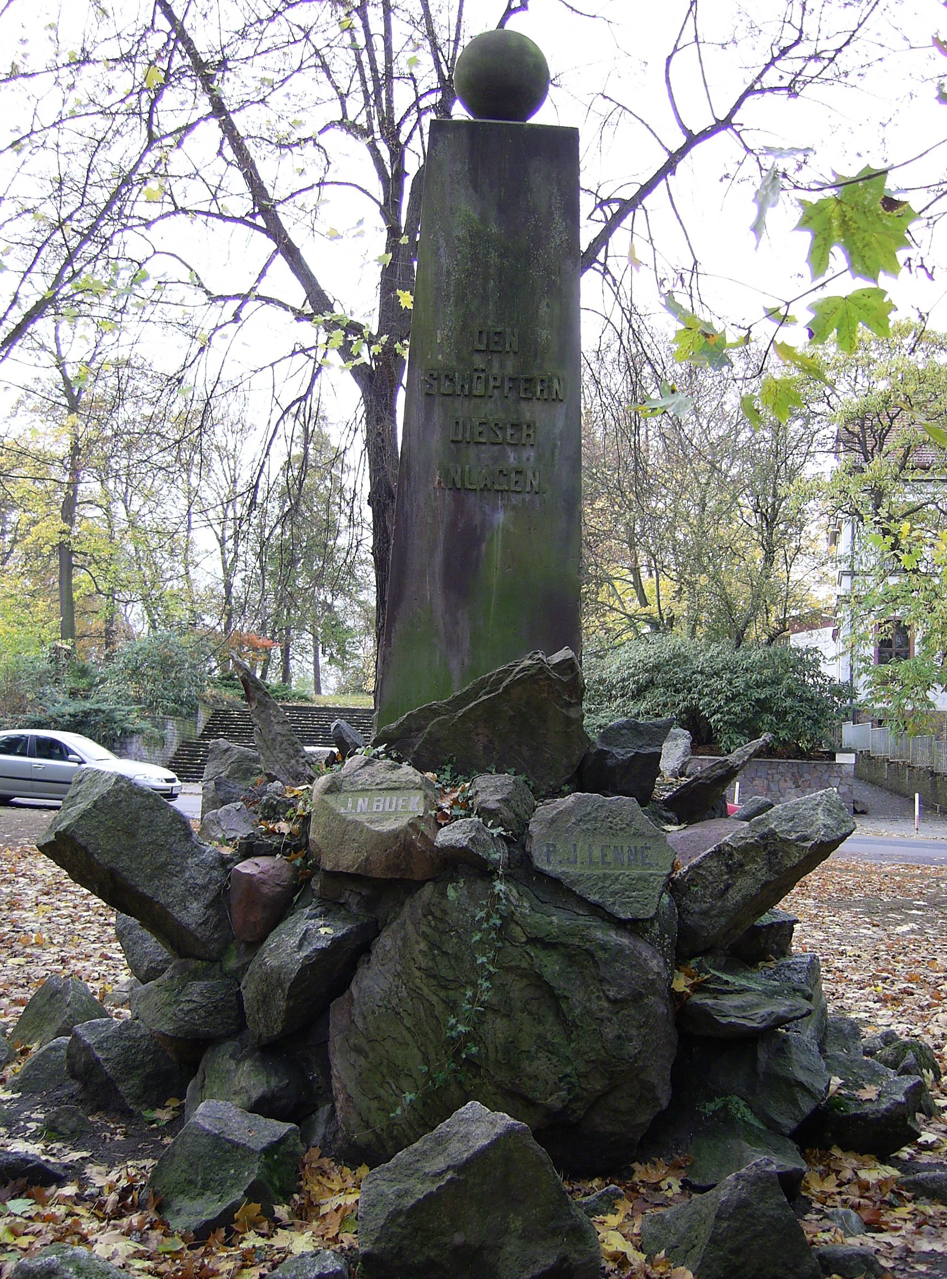 Denkmal Den Schöpfern dieser Anlagen in Frankfurt (Oder).